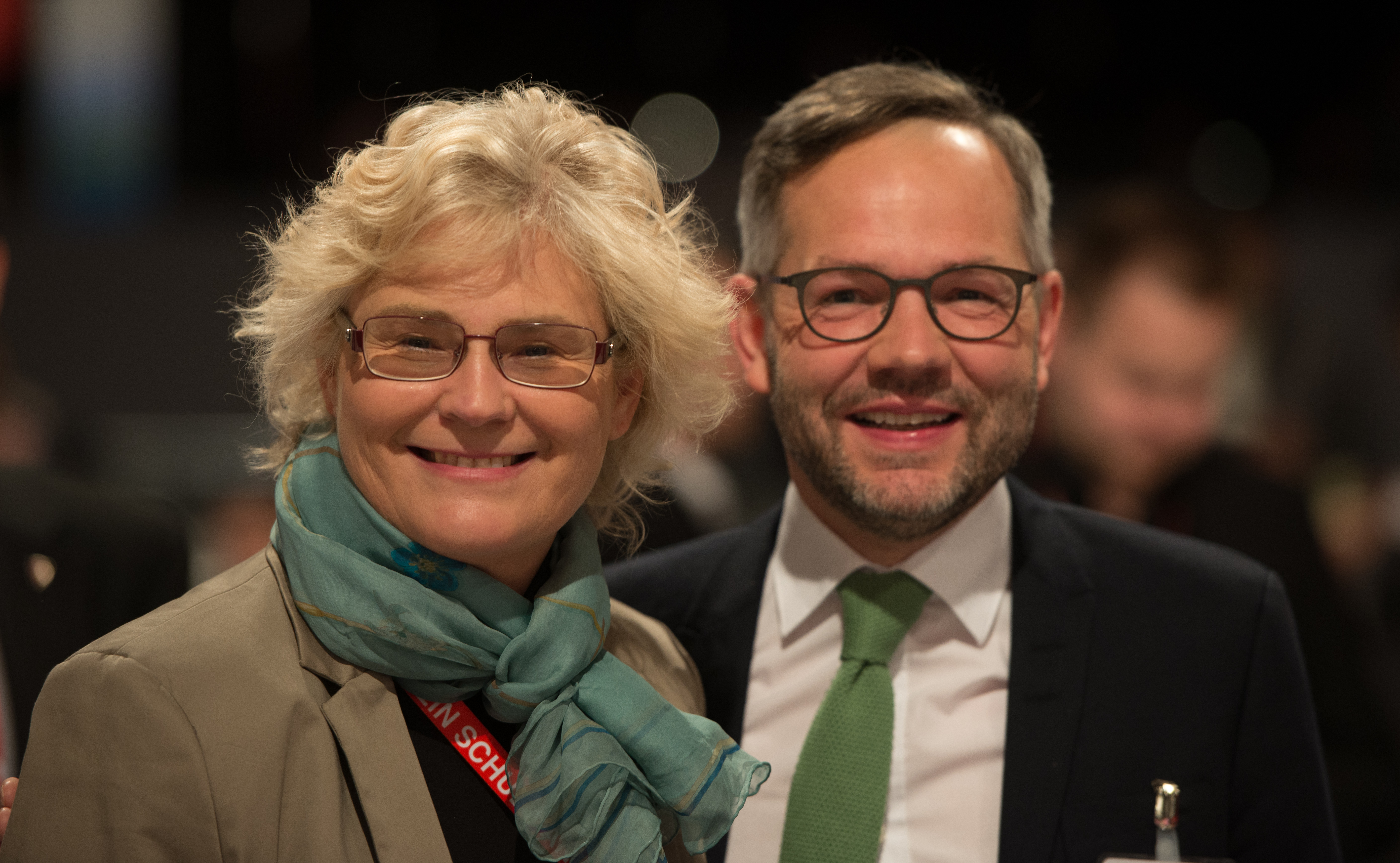 Christine Lambrecht und Michael Roth auf dem SPD Bundesparteitag am 19. März 2017 in Berlin